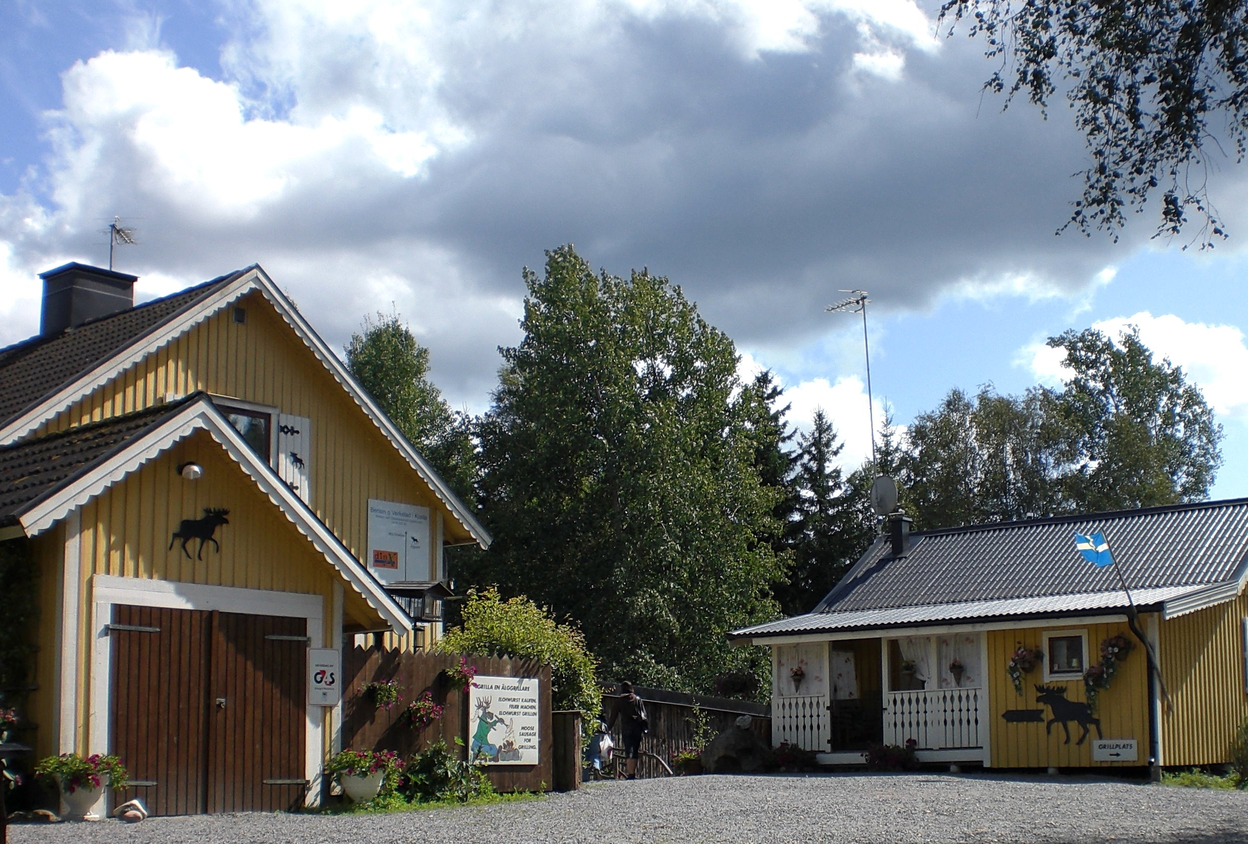 Eingangsbereich zum Elchpark in Kosta, Schweden